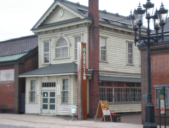 Daisetsu ji-beer hall